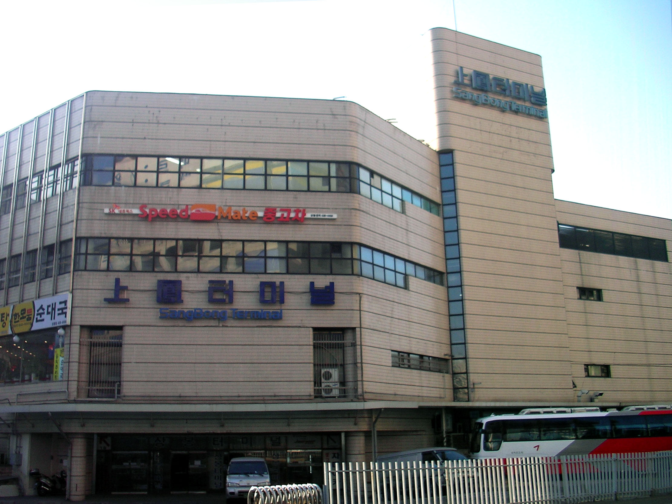 Sangbong Bus Terminal (上鳳터미널) (ko)